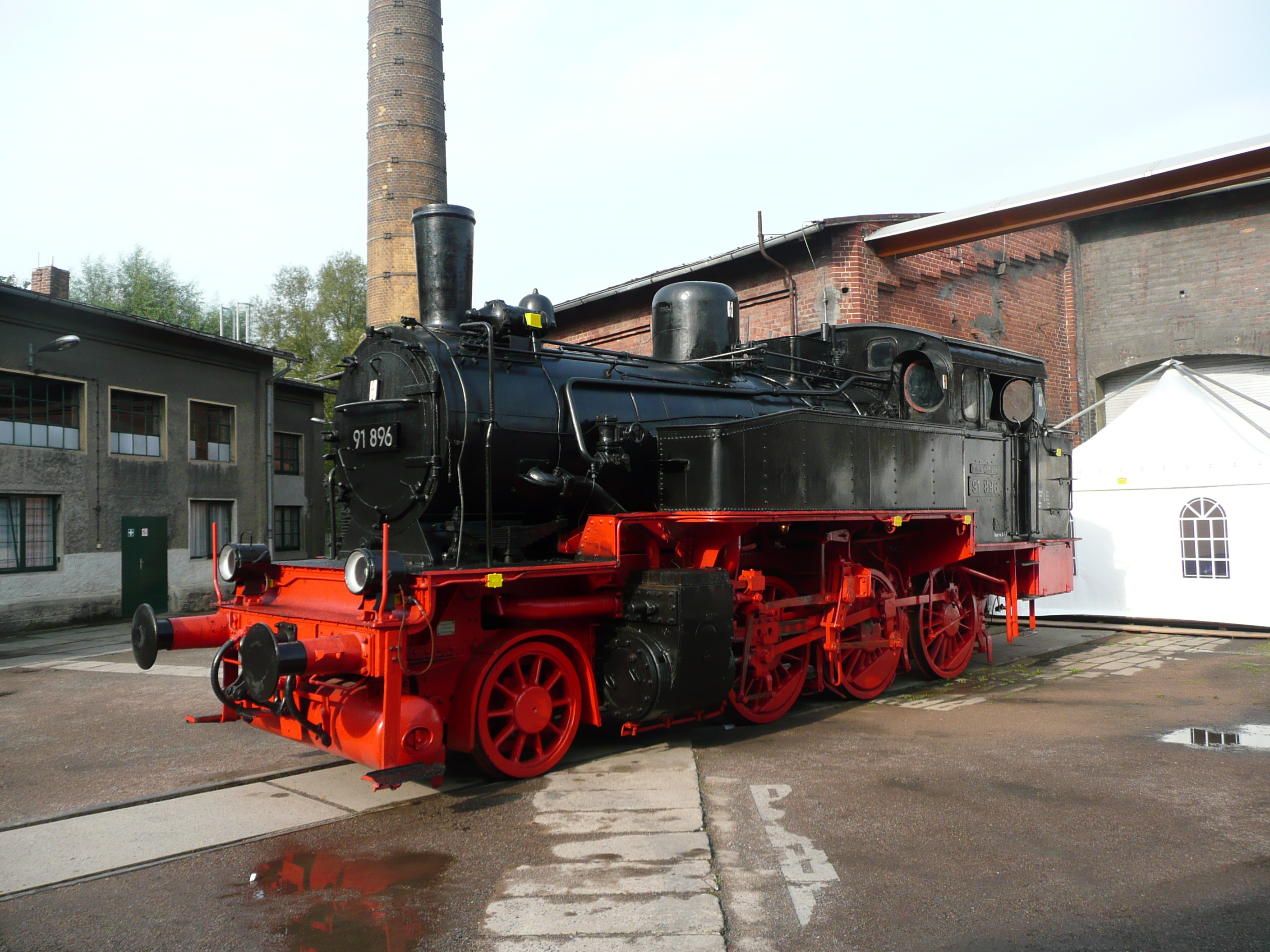 91 896 auf Ihrem neuen Domizil in Chemnitz Hilbersdorf